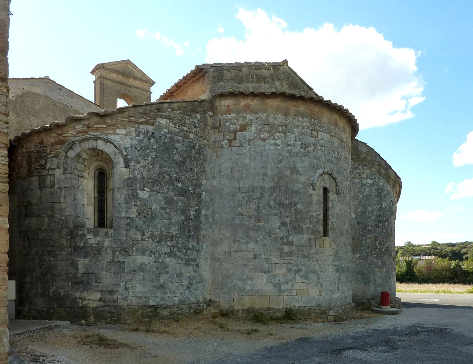 Église de Notre-Dame de Gattigues (Aigaliers)